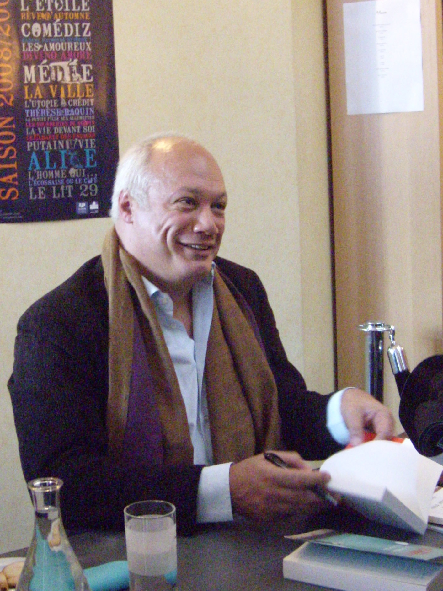 Éric-Emmanuel Schmitt en dédicace à la Comédie de Picardie, Amiens.